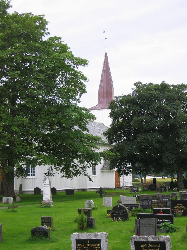 Stadsbygd kirke sett fra nordøst